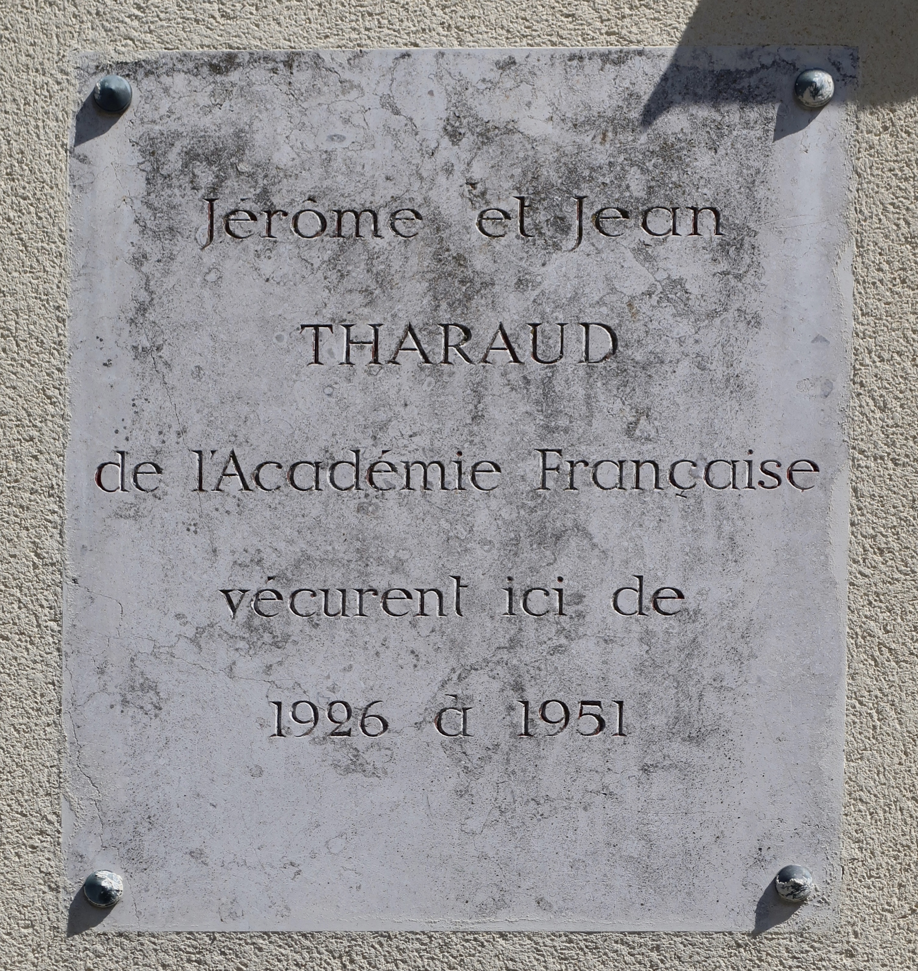 Plaque en hommage à Jérôme et Jean Tharaud, 93 rue Royale à Versailles (Yvelines).